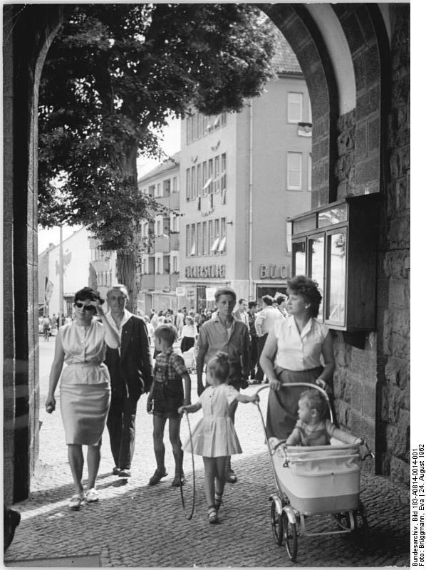 Nordhausen, Blick auf die Rathausstraße Zentralbild Brüggmann Co. 24.8.1962 Nordhausen - alte und neue Stadt am Harz Ein Anziehungspunkt für Touristen aus der DDR und aus dem Ausland ist die über 1.000 Jahre alte Stadt Nordhausen am Südrand des Harzes. Die Stadt, heute zählt sie etwa 40.000 Einwohner, wurde im 2. Weltkrieg zu fast 75 Prozent zerstört. Über 8 800 Menschen fielen den anglo-amerikanischen Bombenangriffen in der Nacht vom 3. zum 4. April 1945 zum Opfer. Die Bürger der historischen Stadt -im Deutschen Bauernkrieg 1525 ein Zentrum der Volksbewegung - begannen nach dem Krieg sofort mit dem Wiederaufbau. Bis 1960 wurden 2000 Wohnungen neu errichtet und Tausende beschädigter Bauten instand gesetzt. UBz: Durchblick zur Rathausstraße.